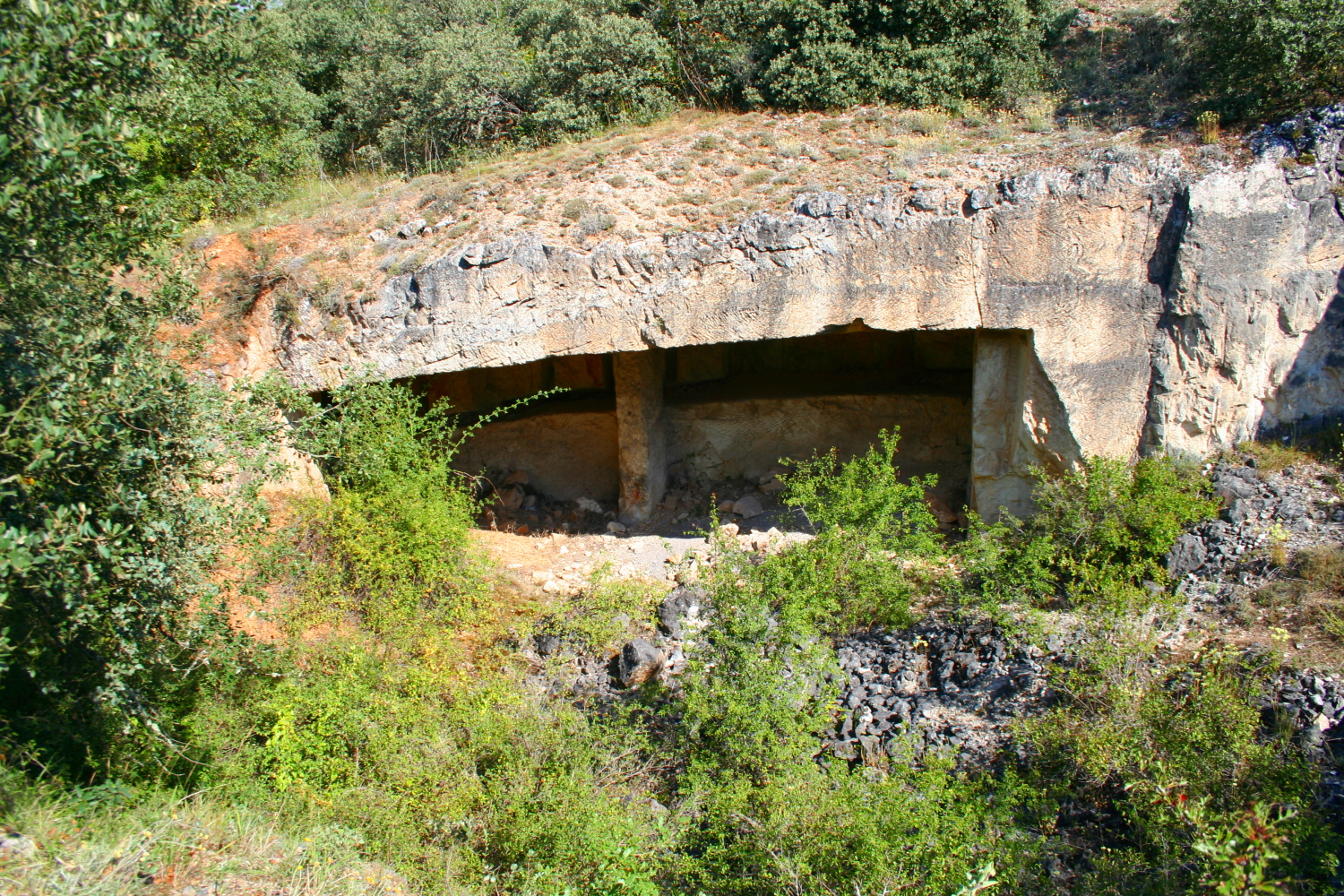 Restos de la antigua cantera en las proximidades de los yacimientos de la Sierra de Atapuerca.